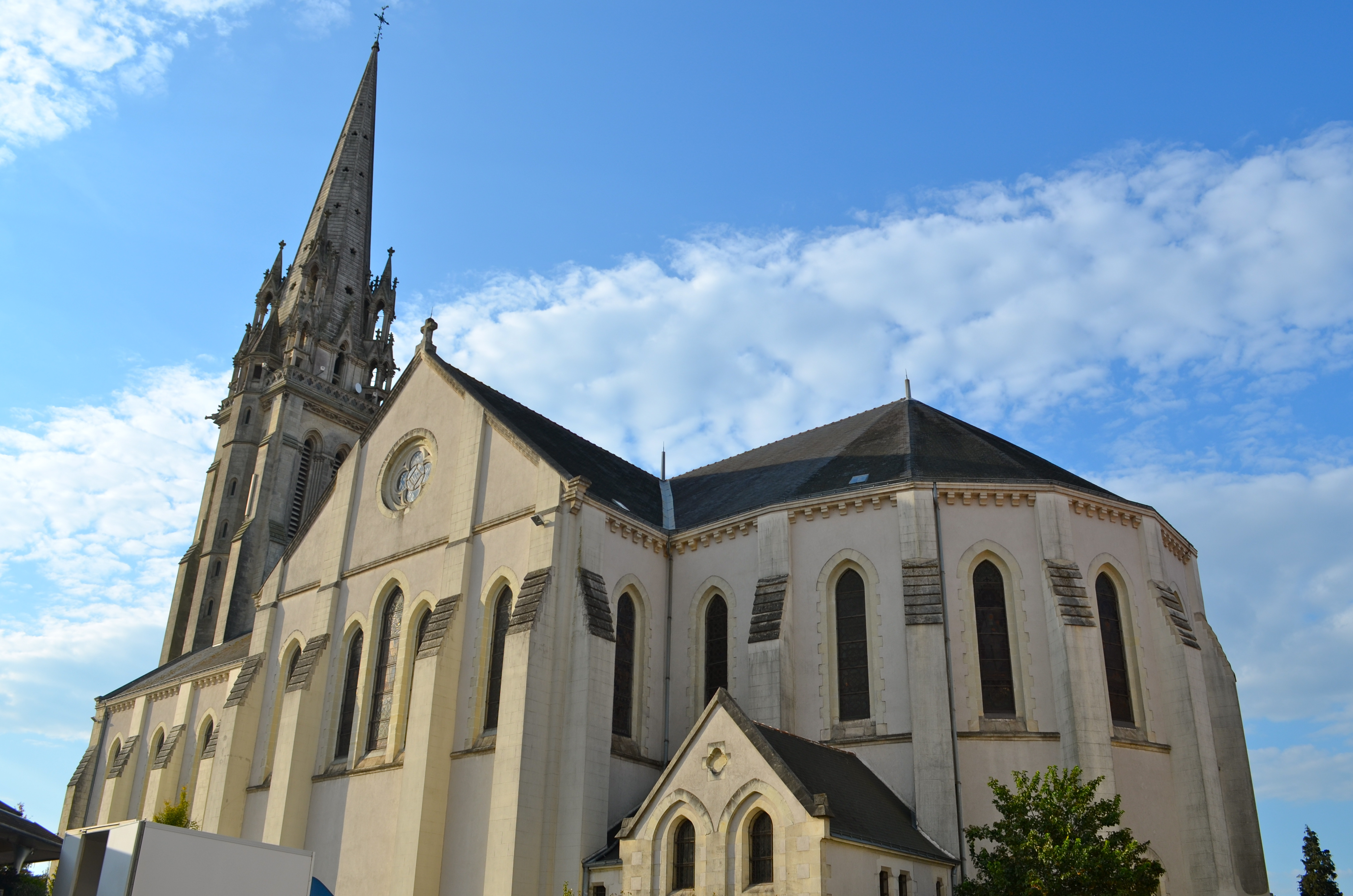 Eglise Saint Jean-Baptiste - Le Loroux-Bottereau (Loire-Atlantique)